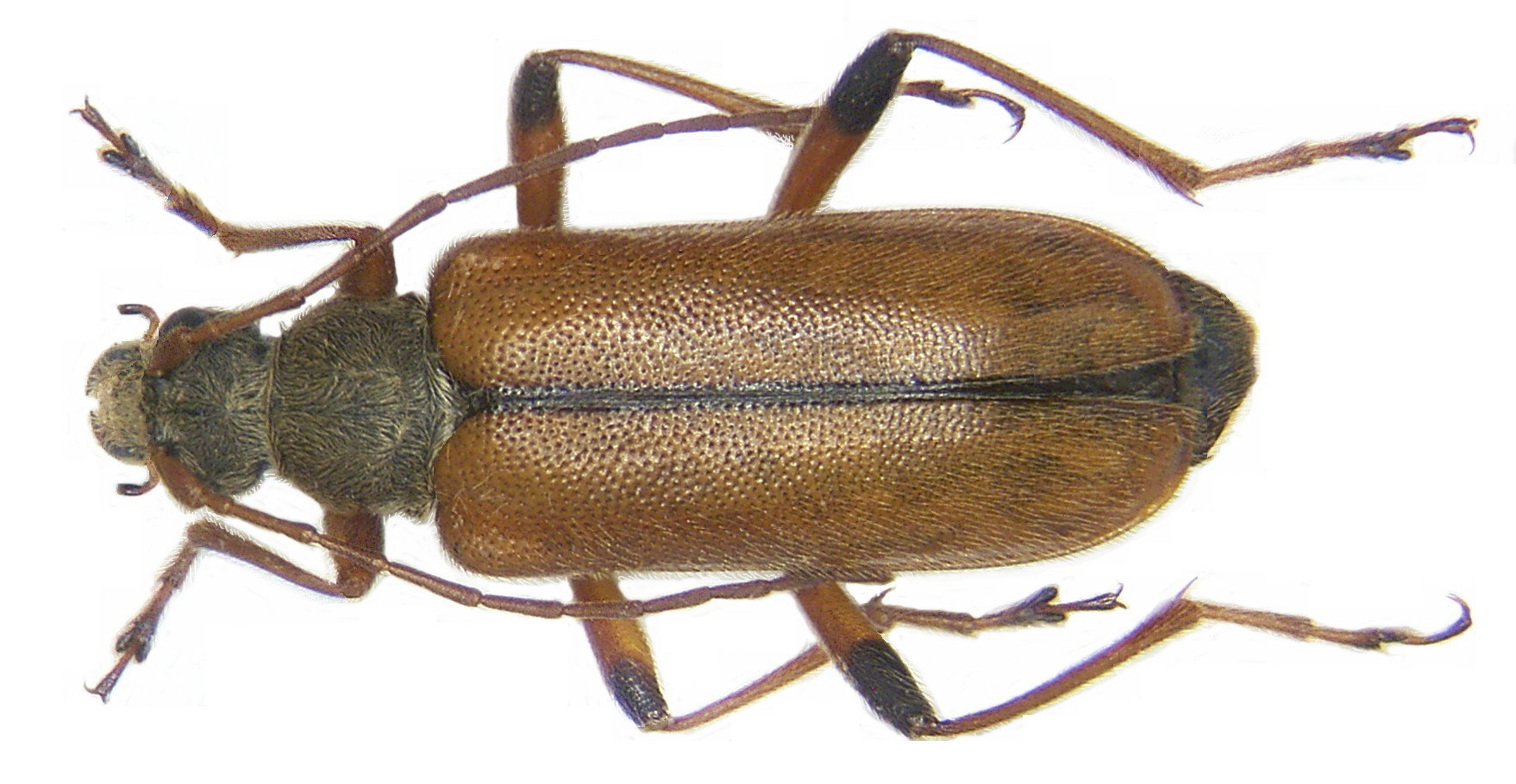 Familie: Cerambycidae Grösse: 8-11 mm Verbreitung: Europa Ökologie: Entwicklung in Eichenholz, Wipfeltier Fundort: Germania, Bayern, Karsbach leg.det. A.Skale, 2004 Foto: U.Schmidt, 2006